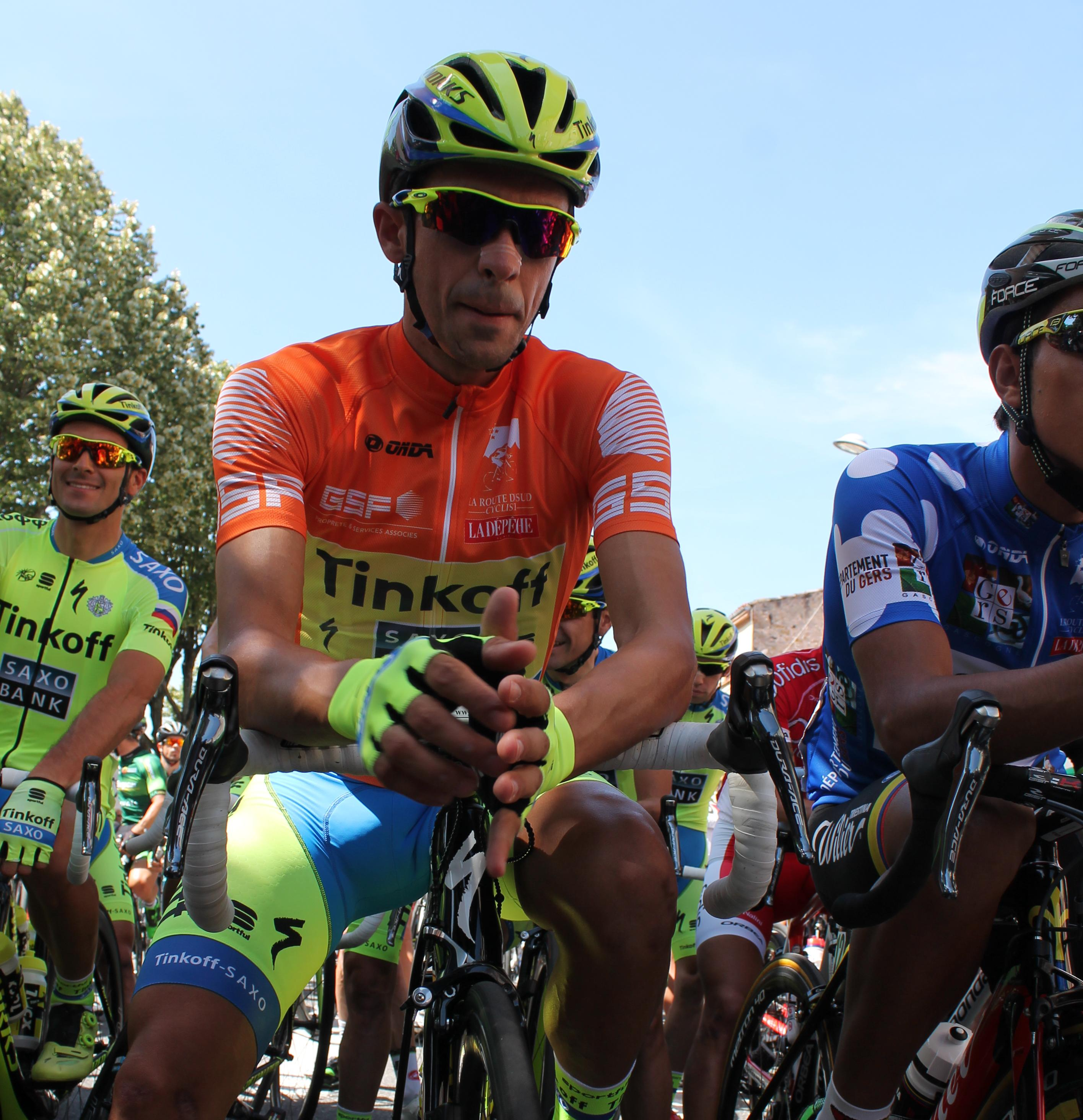 Alberto Contador (Tinkoff Saxo) prend le départ de la 4ème et dernière étape de la Route du Sud 2015 Revel - Gaillac, avec le maillot de leader.